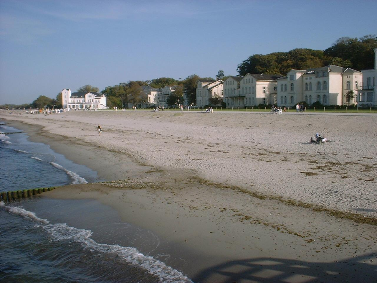 Beschreibung: Strand und Promenade in Heiligendamm Quelle: selbst fotografiert Fotograf/Zeichner: Doris Antony, Berlin Datum der Aufnahme: 17.09.2003 Lizenzstatus: Doris Antony put it under the GFDL and CC-BY-SA-2.5 from de.wikipedia [1] 18:09, 7. Mär 2005 . . DorisAntony (Diskussion) . . 1280 x 960 (154397 Byte) (Strand)